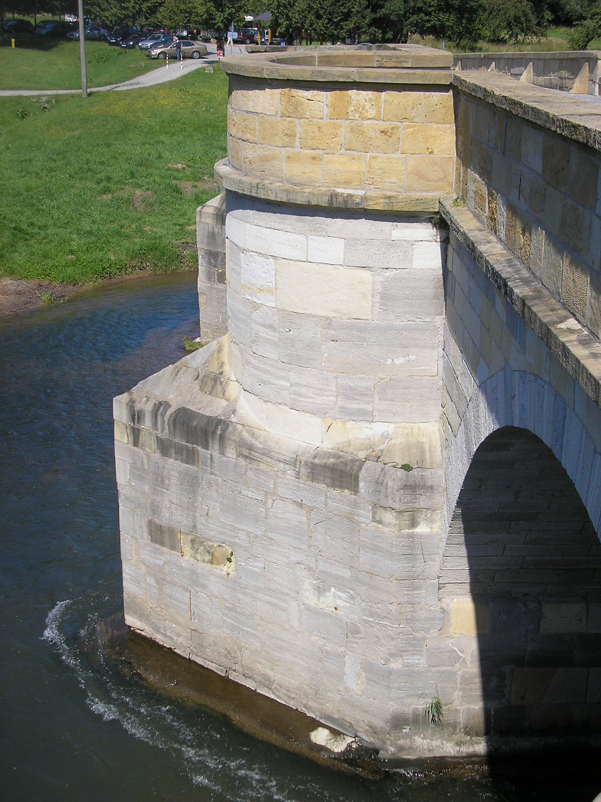 Ein Pfeiler der Werrabrücke in Creuzburg (Thüringen).